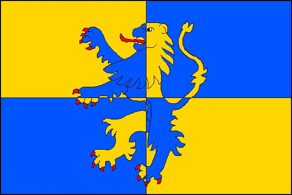 Vlajka obce Valdice